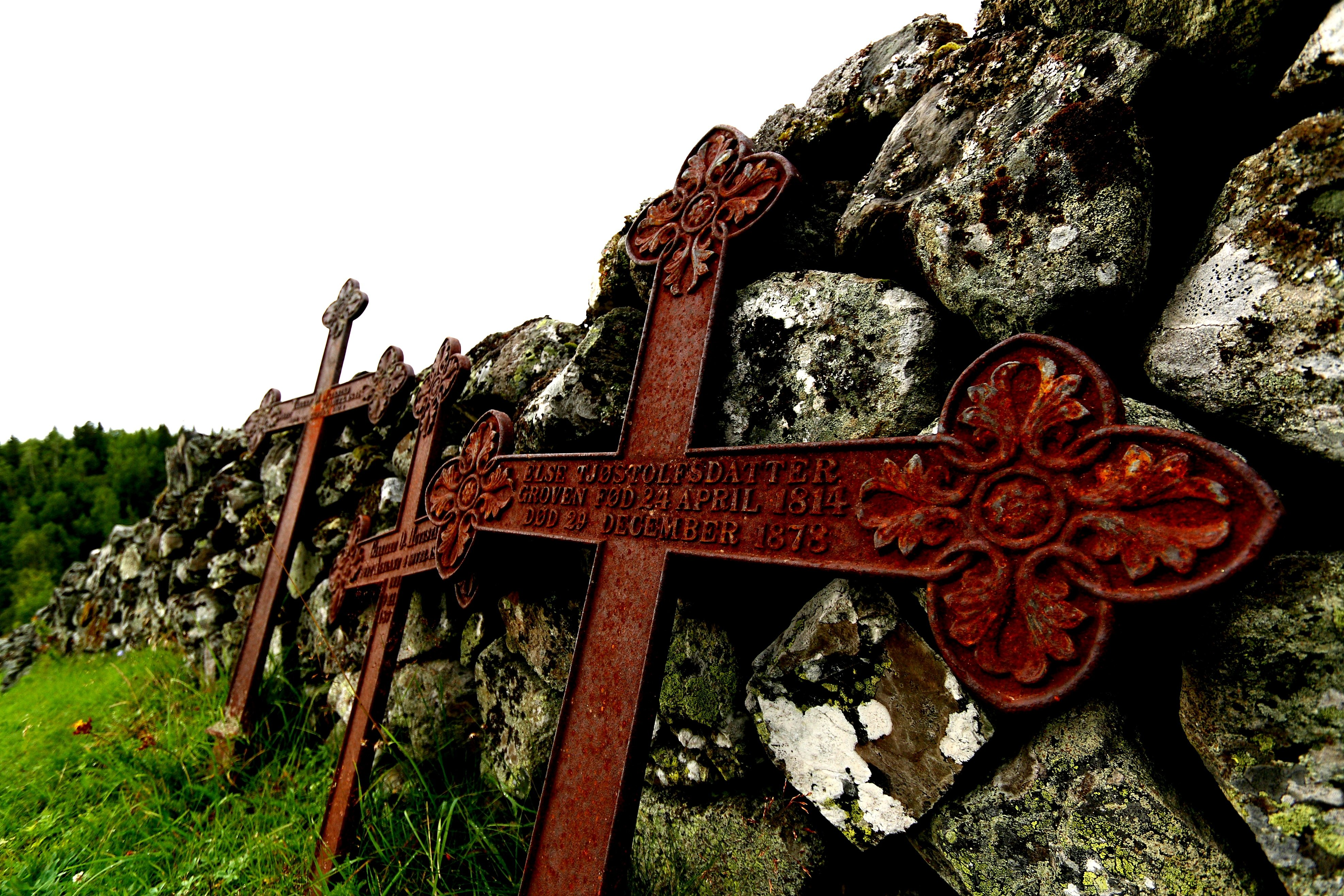 Gamle gravminne ved kyrkjegardsmuren ved Eidsborg stavkyrkje i Tokke i Telemark